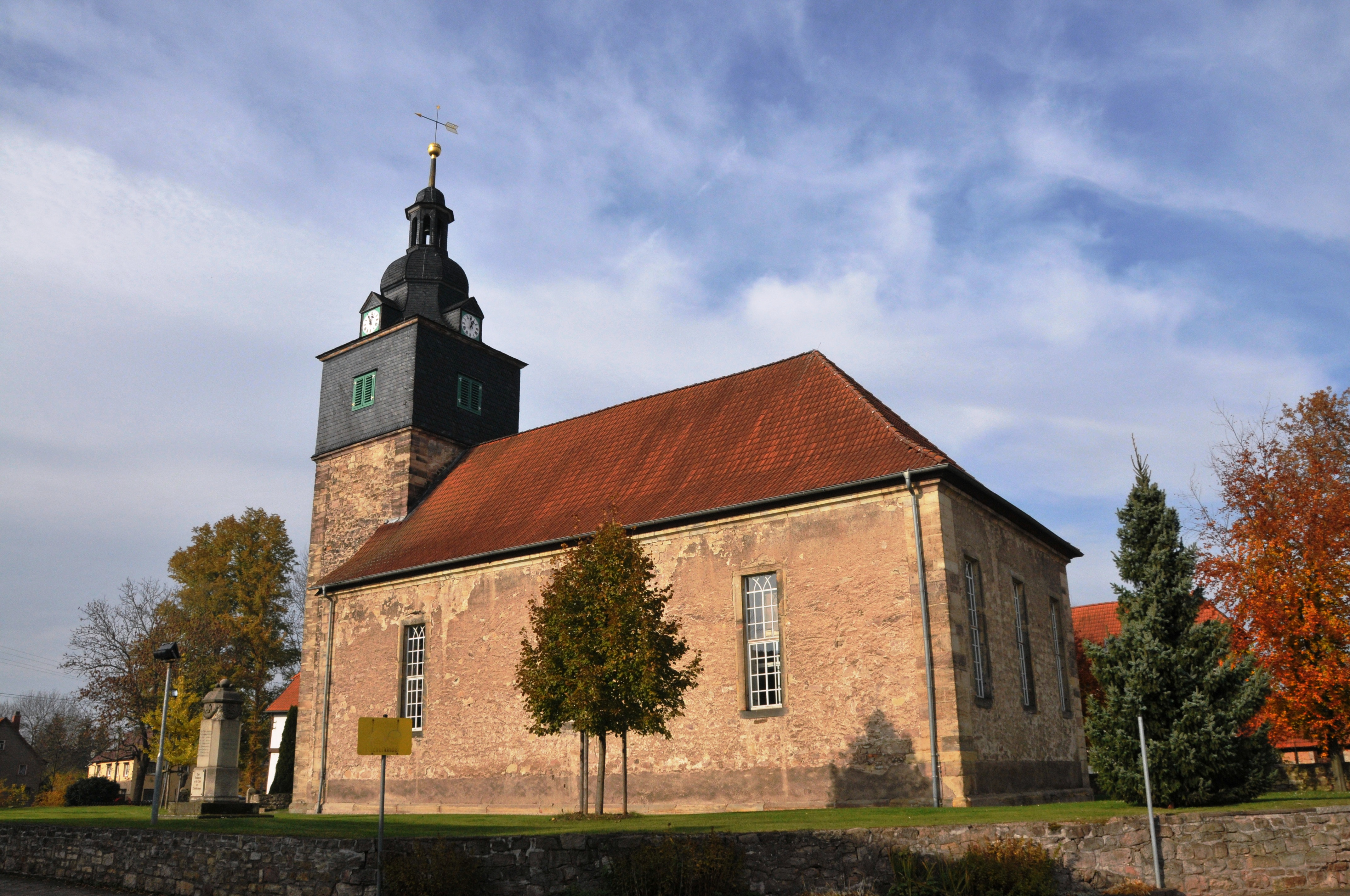 Laucha, Kirche